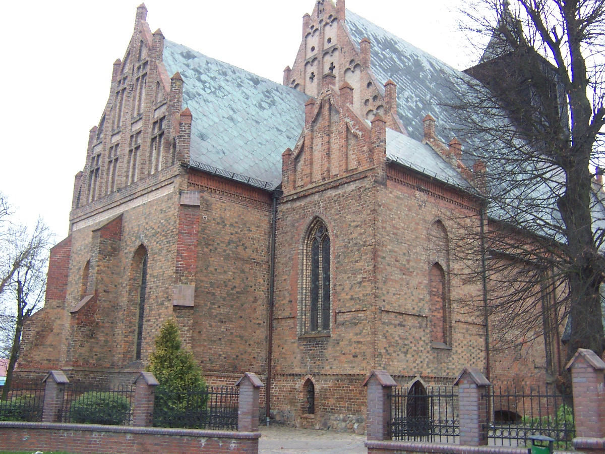 Kościół parafialny pw św jana Chrzciciela w Międzyrzeczu